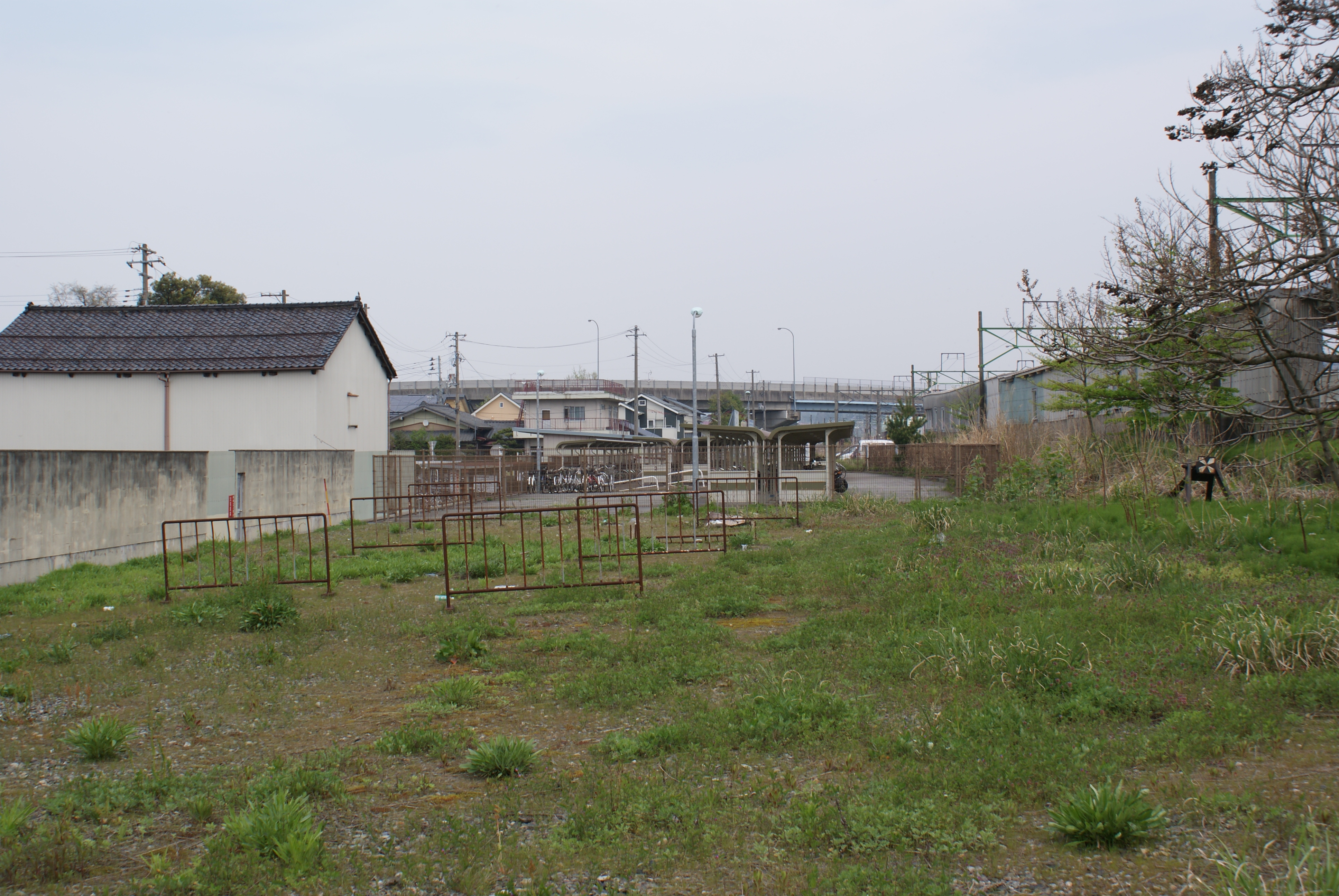 旧蒲原鉄道加茂駅跡。かつての終端部付近より旧構内を見る。